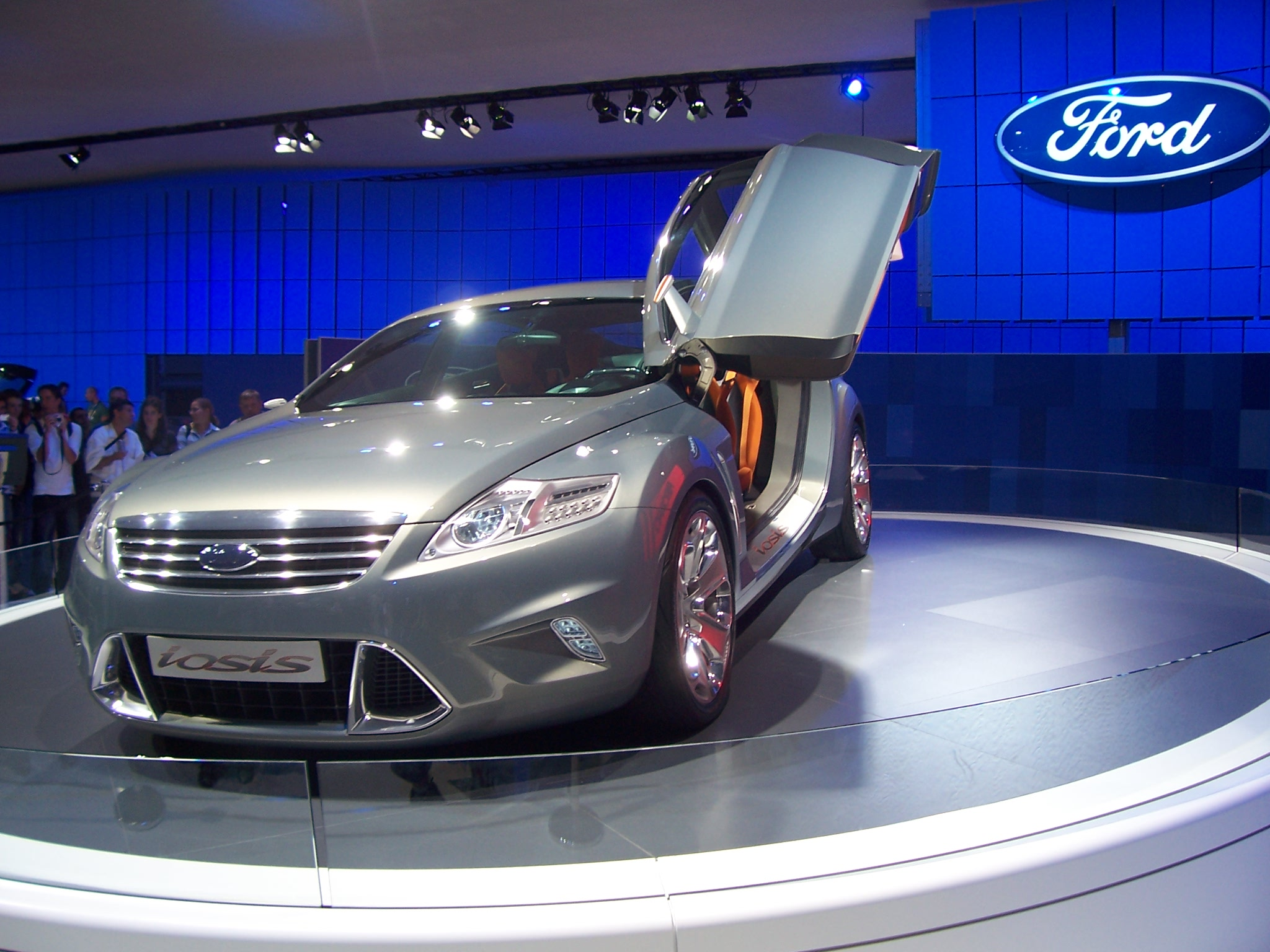 Ford Iosis auf der IAA 2005 in Frankfurt am Main. Aufgenommen am 15.09.2005.